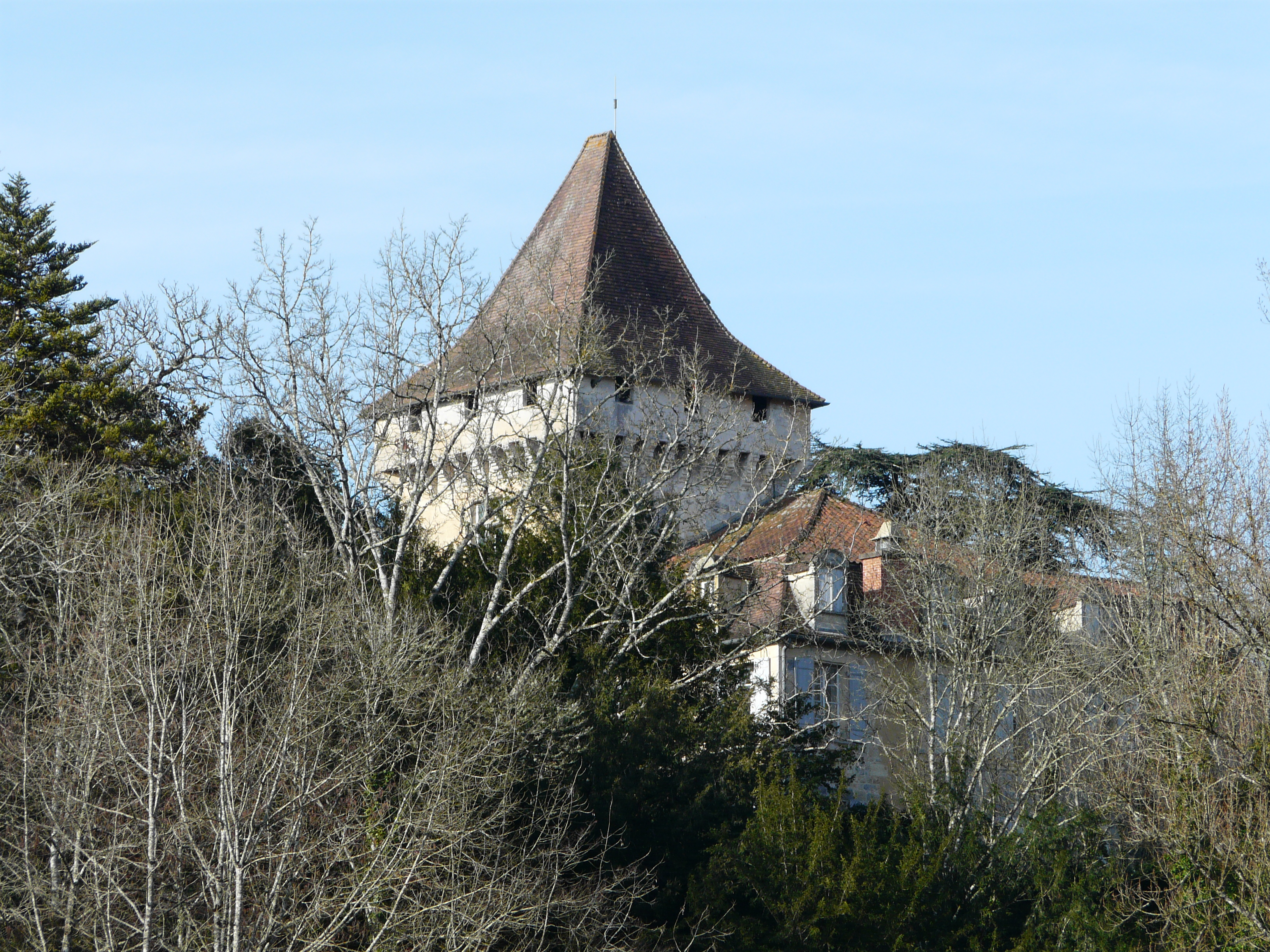 Le château de Bayac, Dordogne, France.